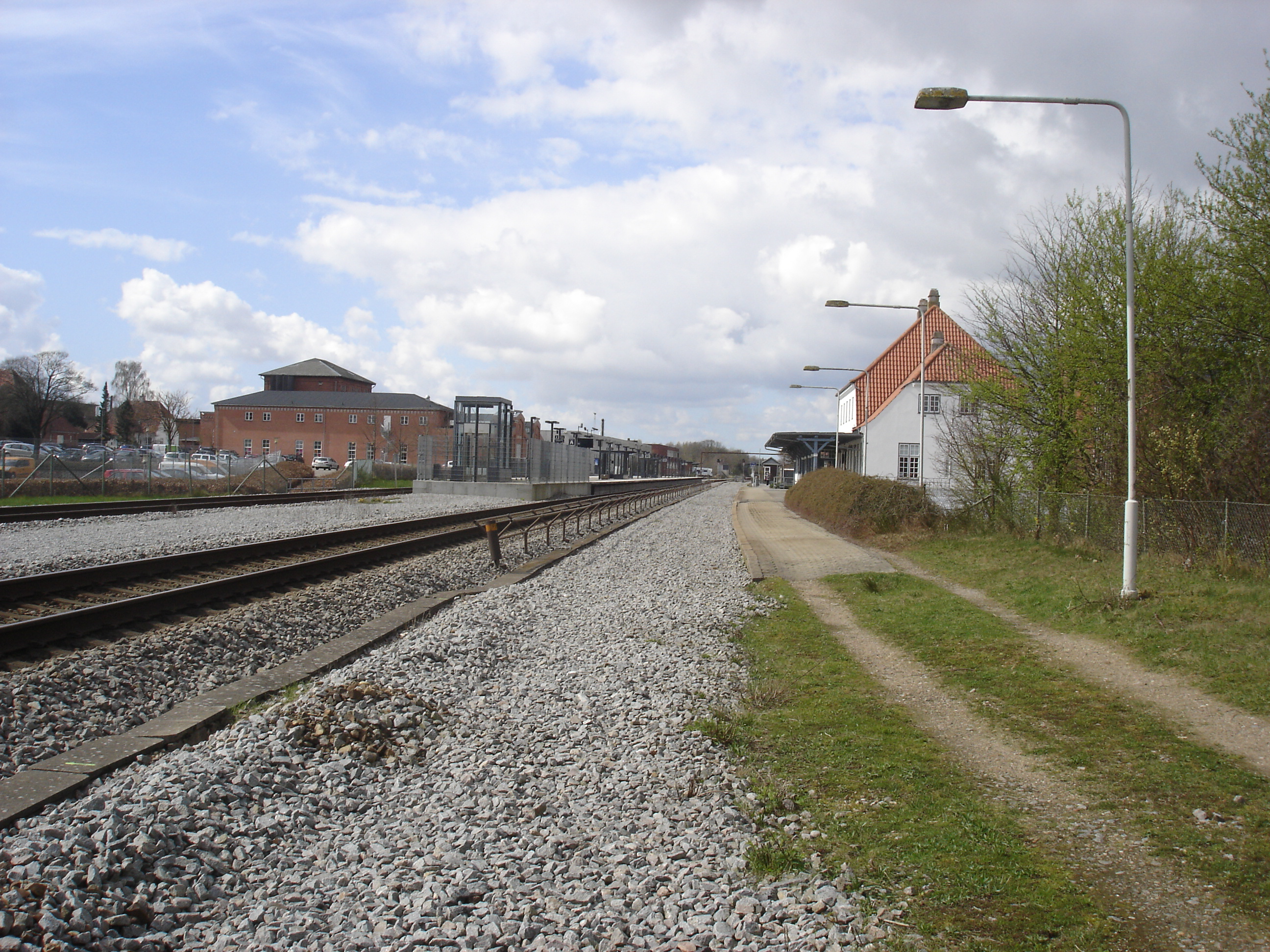 Troldhedebanens tracé går over Nørregade sammen med den eksisterende jernbane og nærmer sig Vejen Station